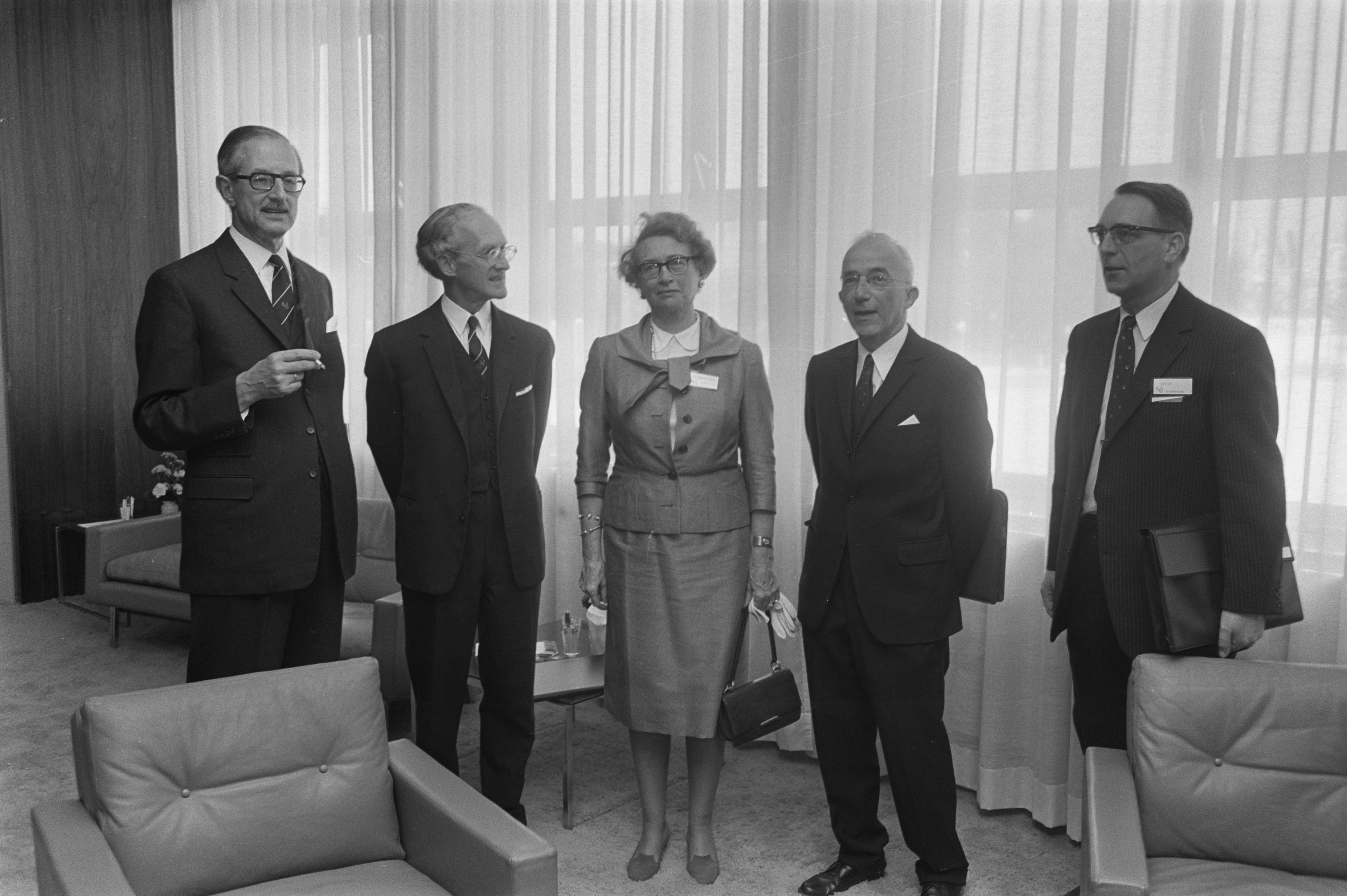 Collectie / Archief : Fotocollectie Anefo Reportage / Serie : [ onbekend ] Beschrijving : Intern. Juristen Congres in Congresgebouw, Den Haag mr. Bos , Wilberforce, mevr. Argnas, minister Carel Polak, prof. K. H. Voous Datum : 24 augustus 1970 Locatie : Den Haag, Zuid-Holland Trefwoorden : congressen Persoonsnaam : Argnas, Mr. Bos, Prof. K. H. Voous Fotograaf : Koch, Eric / Anefo Auteursrechthebbende : Nationaal Archief Materiaalsoort : Negatief (zwart/wit) Nummer archiefinventaris : bekijk toegang 2.24.01.05 Bestanddeelnummer : 923-7741